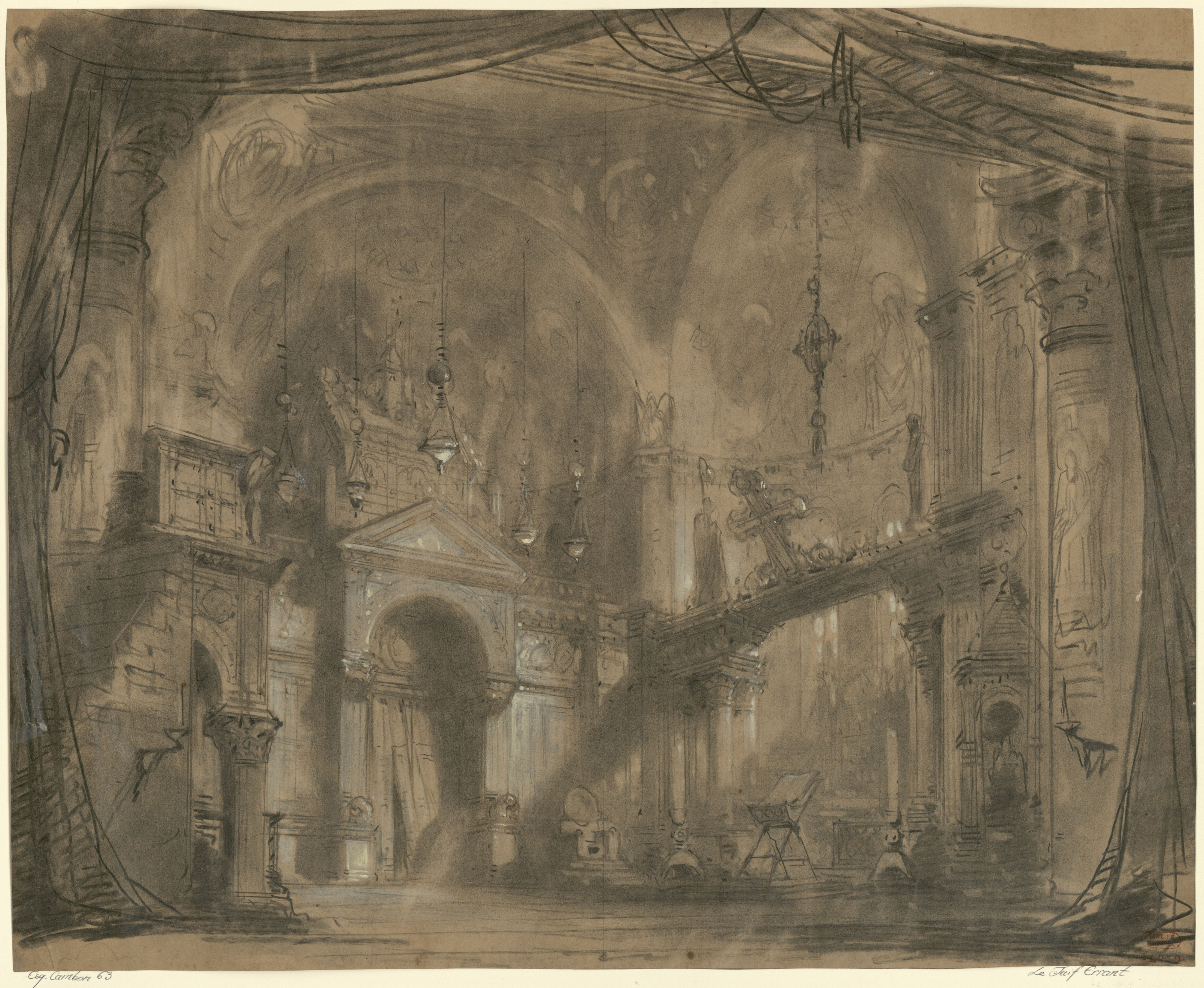 Esquisse de décor de l'acte IV, tableau 1 du Juif errant de J.F. Halévy par Charles Cambon (pastel et rehauts de blanc sur papier beige)